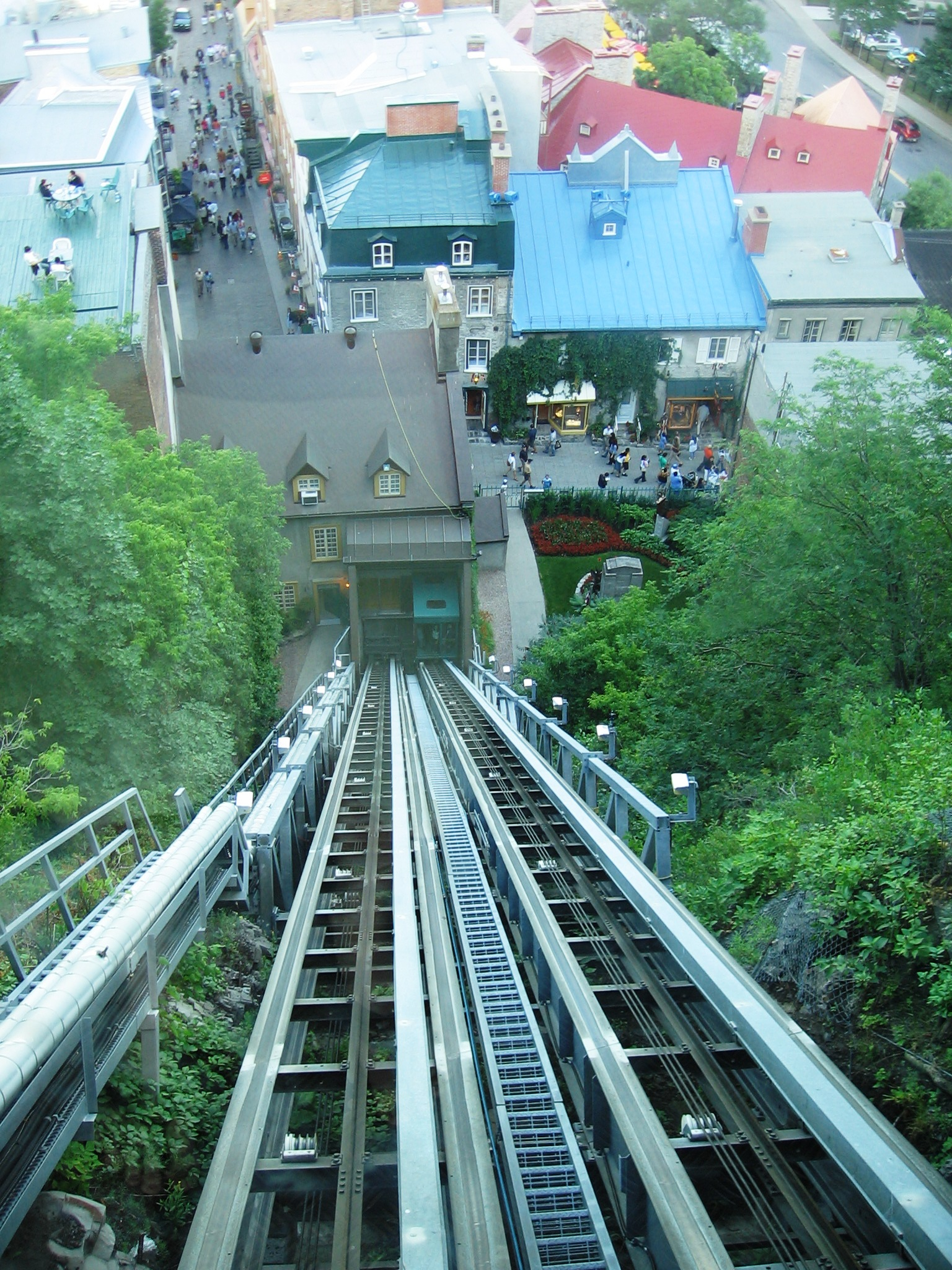 Lanovka v Québecu